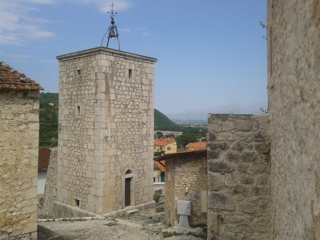 Torre di San Martino in Agne